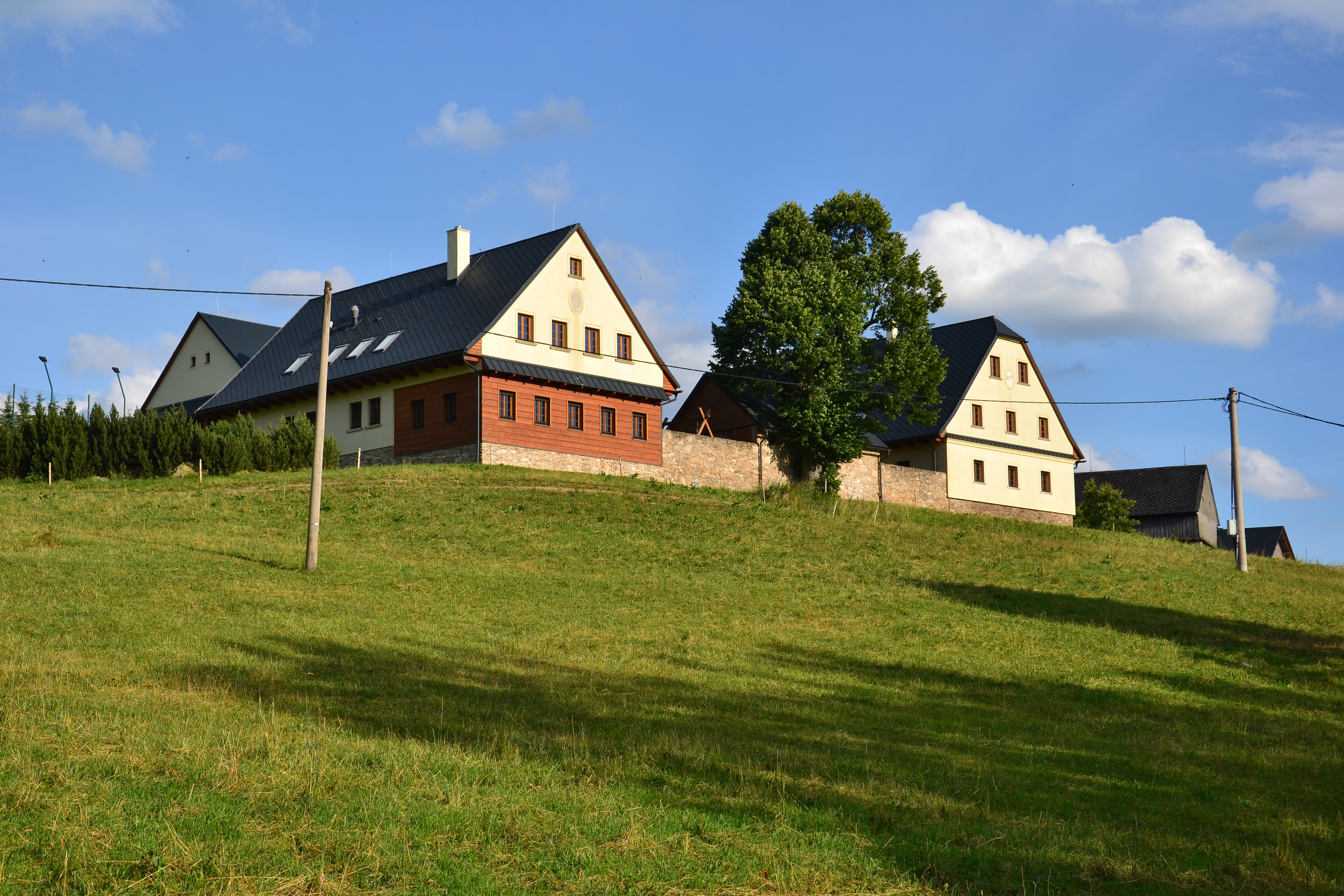 Domy čp. 22 a 122